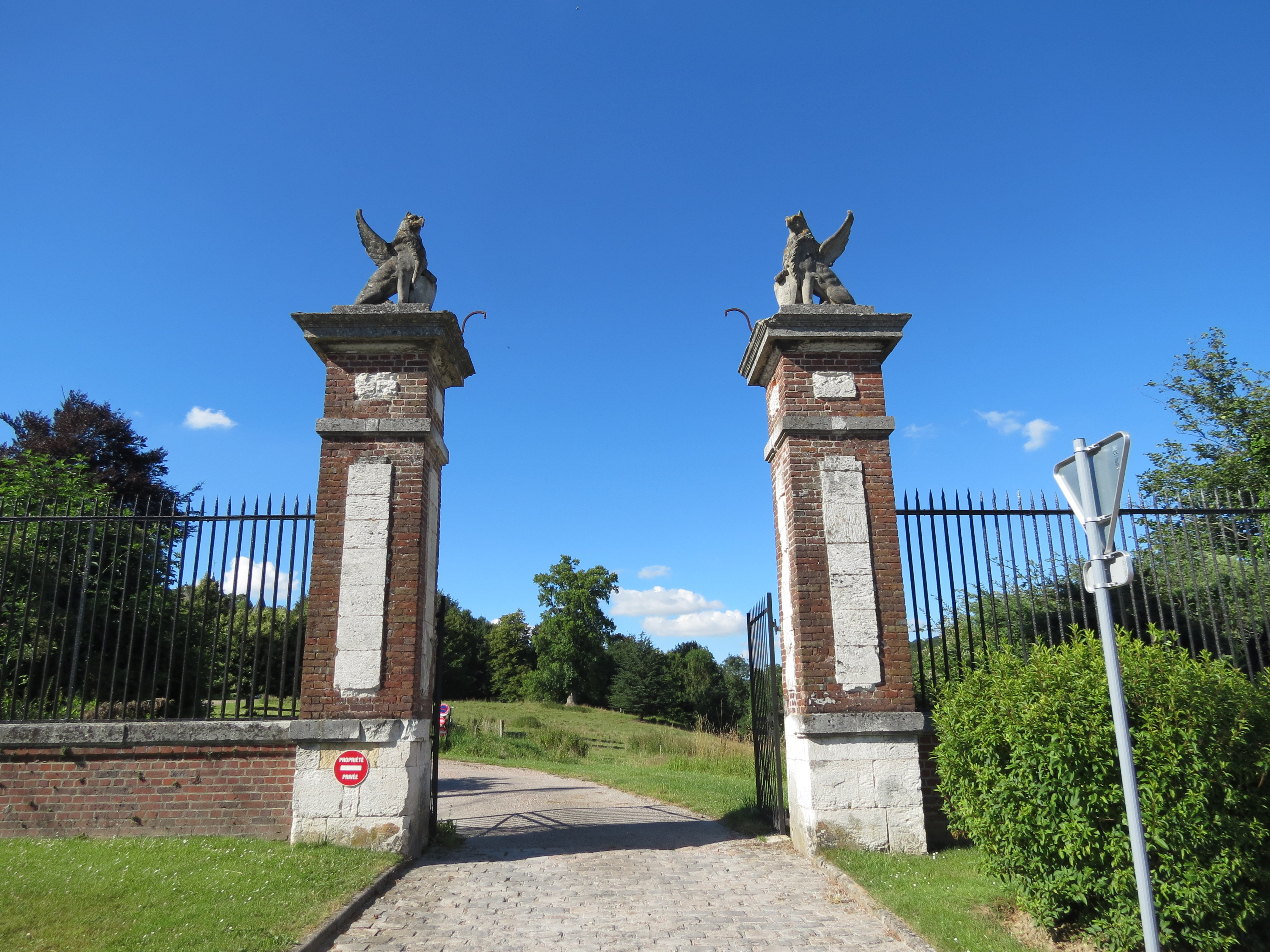 Château d'Esneval.